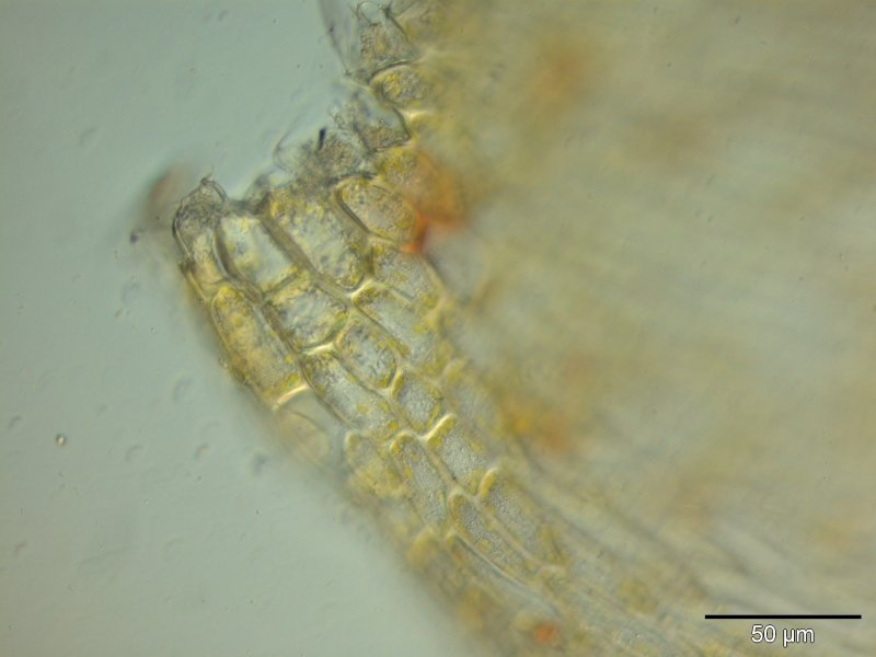 Glattstieliges Kurzbüchsenmoos (Brachythecium salebrosum), Blattflügel, Vergrößerung: 400x